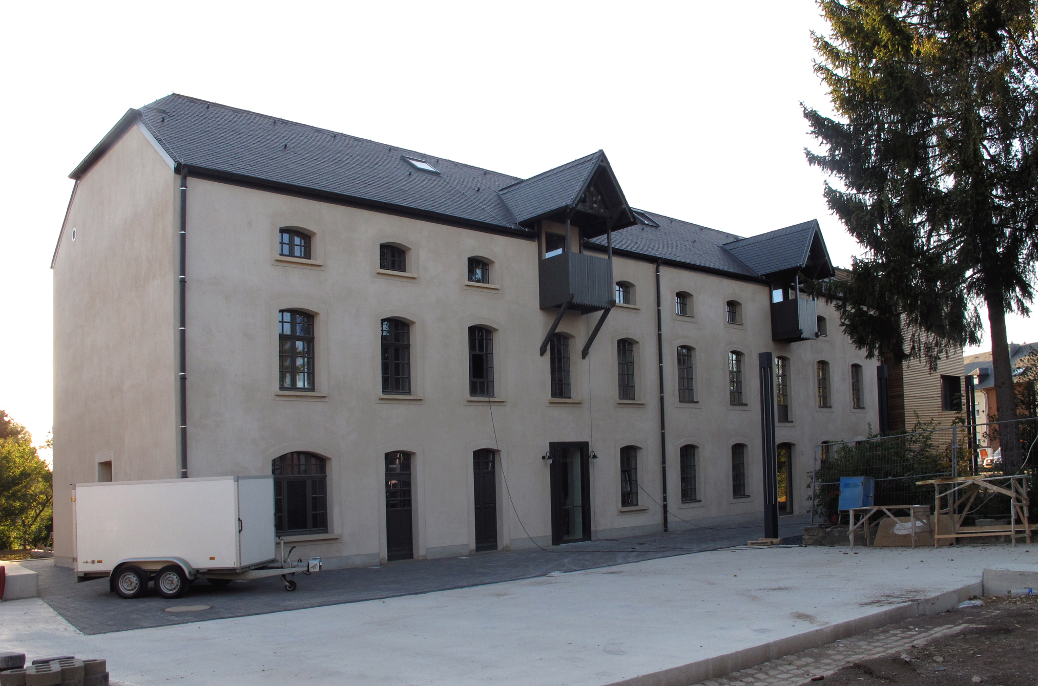 Alte Mühle, rue de l'église in Petingen, Luxemburg